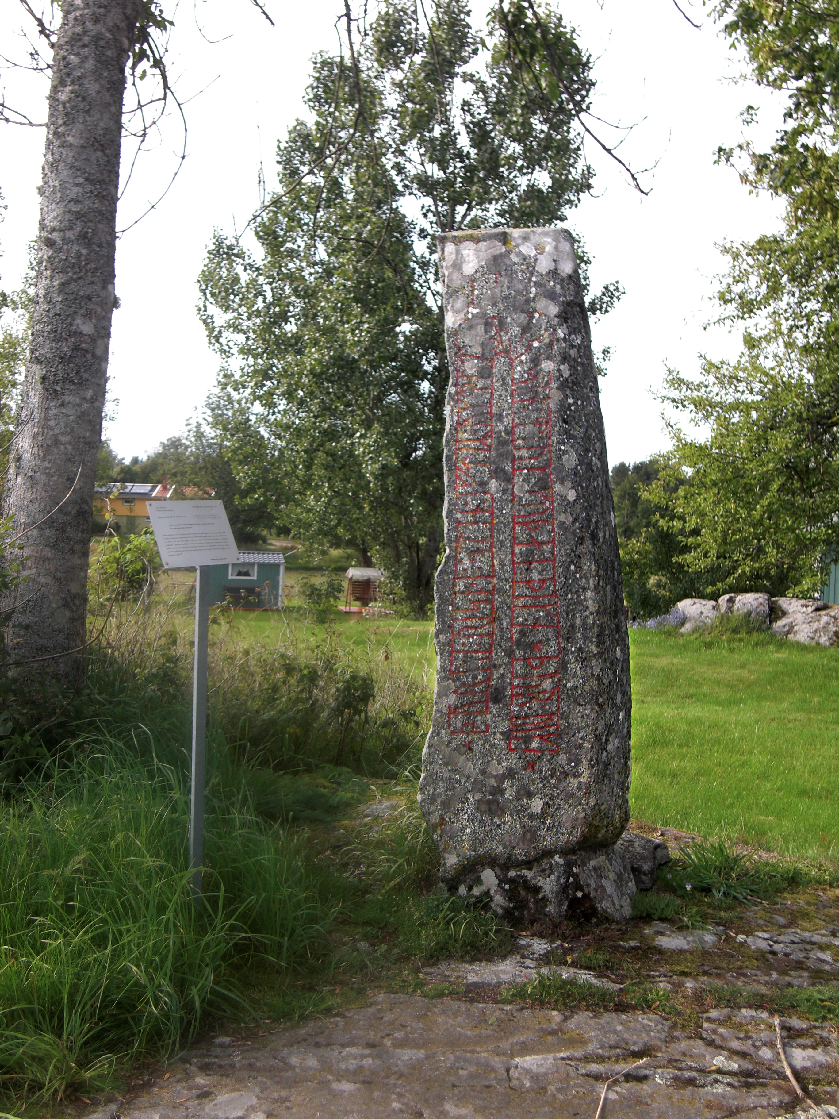 Velandastenen Vg 150 (Raä-nr Väne-Åsaka 8:1) i Väne-Åsaka socken, Väne härad, Västergötland, Sverige.